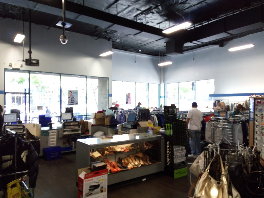 Interior tienda Goodwill en California.